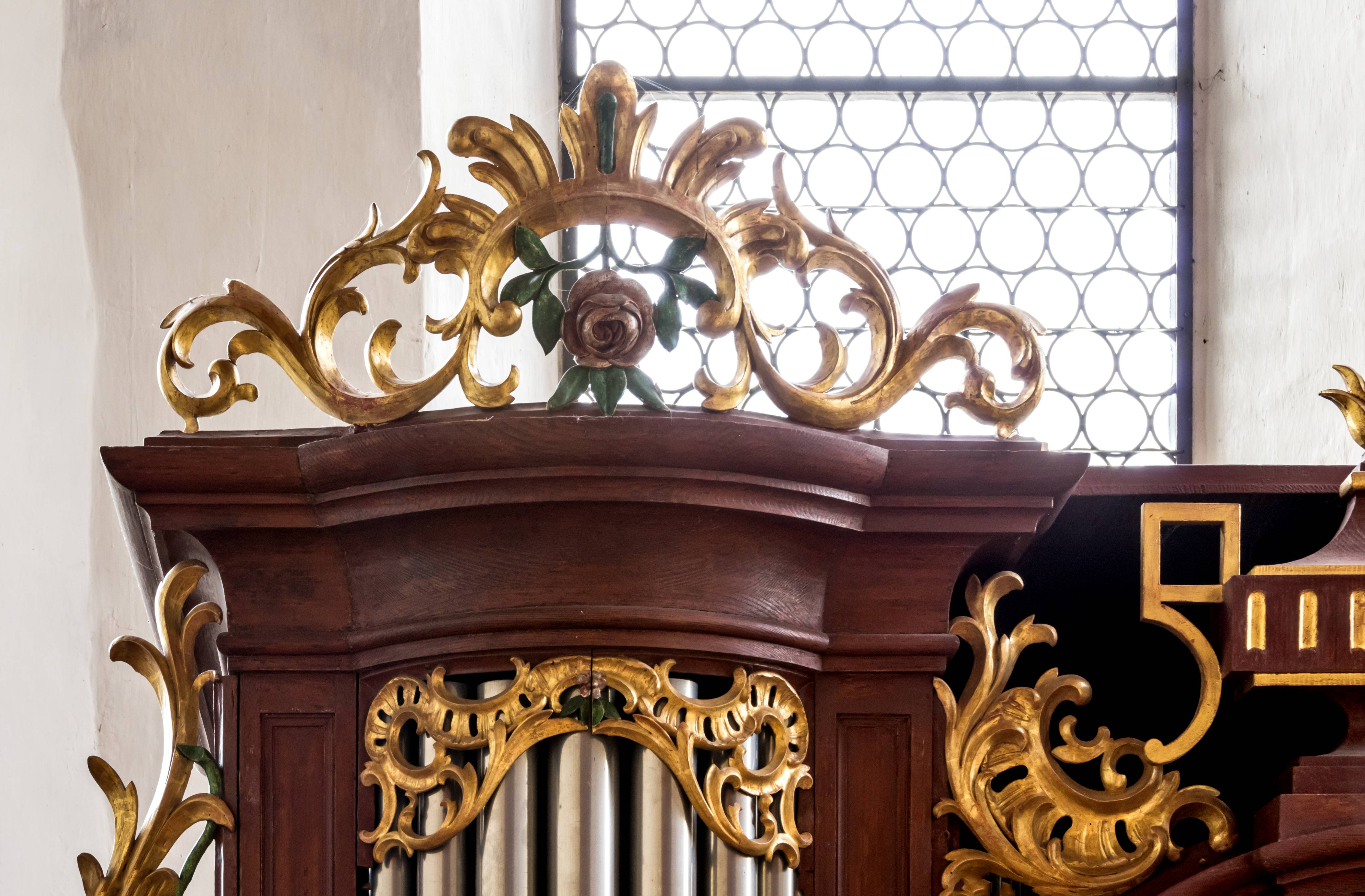 Bilder aus der evangelischen Kirche in Fischingen Die Orgel von Xaver Bernauer aus dem Jahre 1810 Der Schmuck auf der Orgel